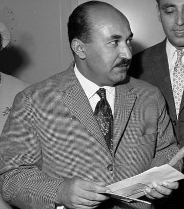 Persischer Landwirtschaftsminister Arsandjani bei einer Presse-Konferenz im Hotel Königshof, Bonn